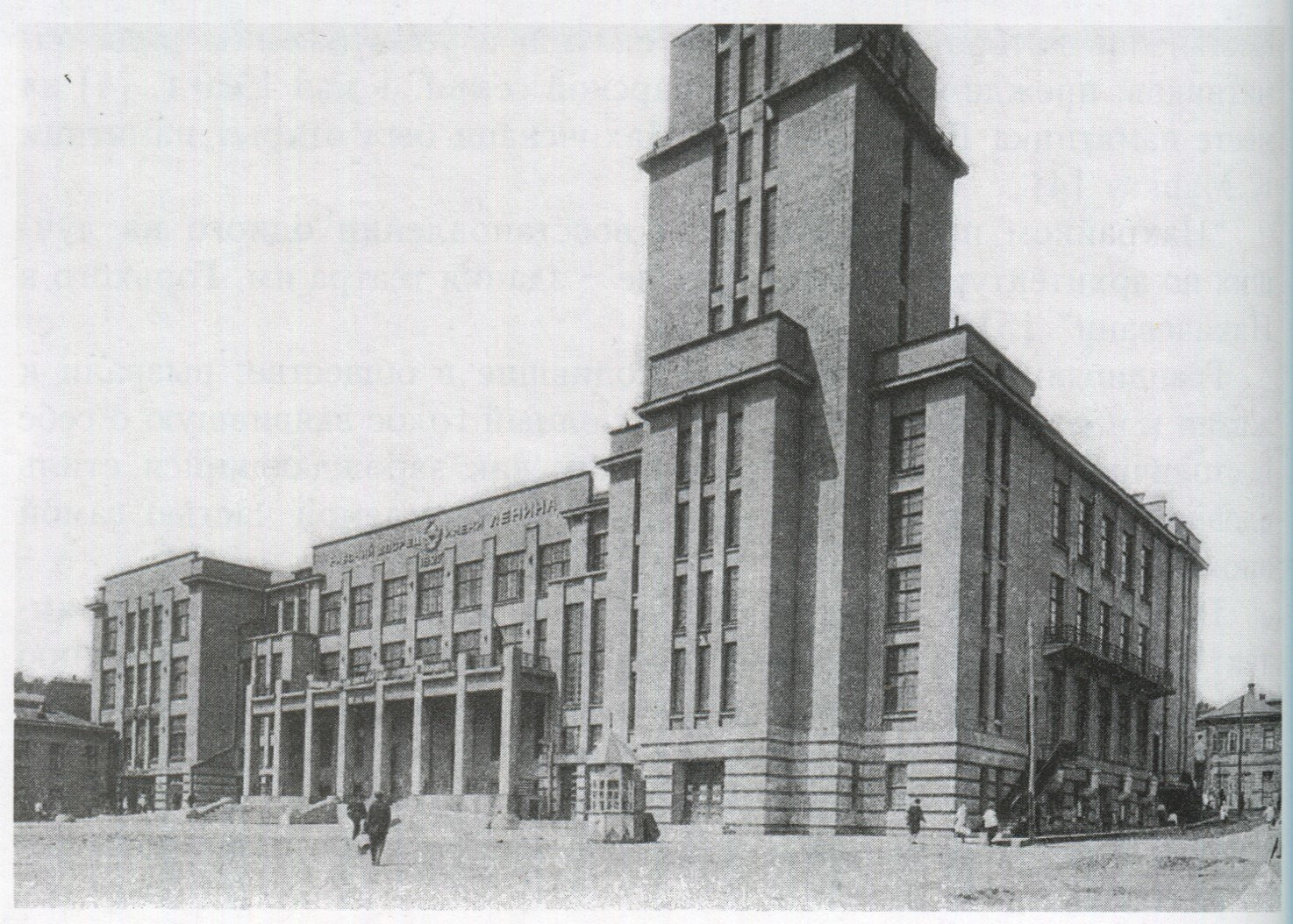 Дворец труда ии. Ленина (дворец культуры железнодорожников)